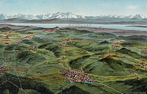 PD AK Pfullendorf und Bodensee von 1900